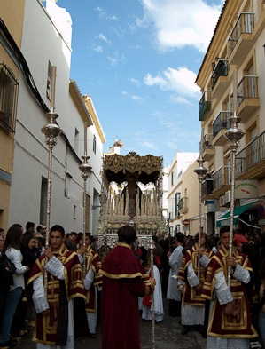 Lágrimas y Esperanza de Chiclana